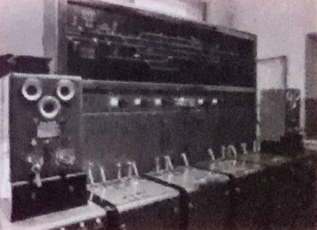 Stazione di Campodazzo - Banco manovra